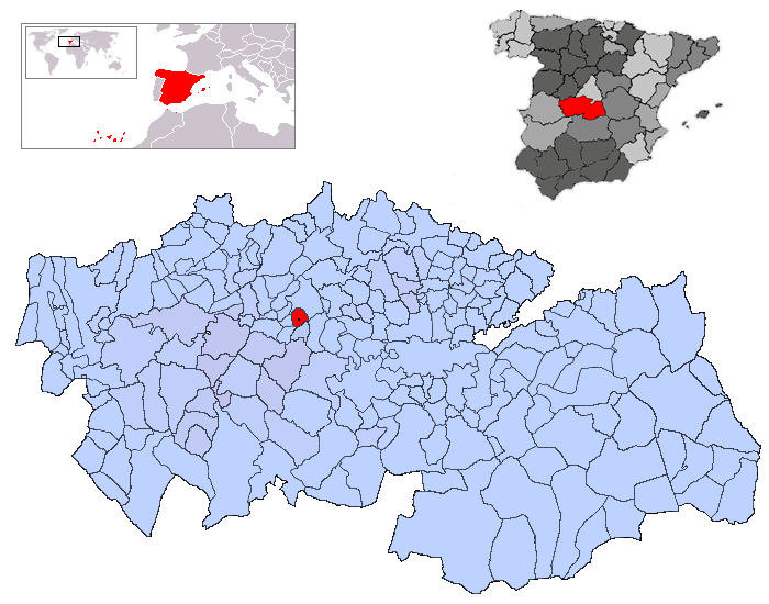 Carriches en la provincia de Toledo